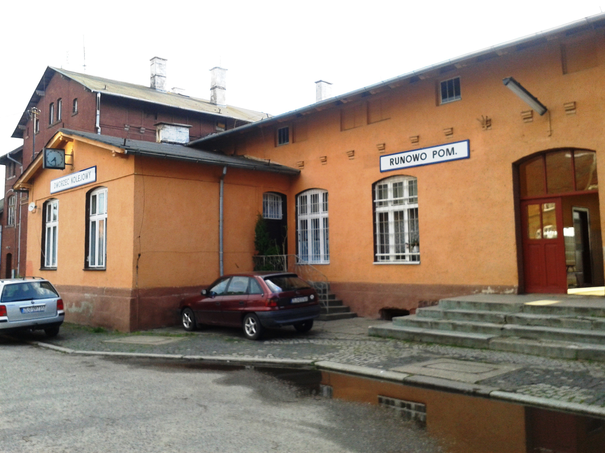 Runowo Pomorskie - stacja kolejowa